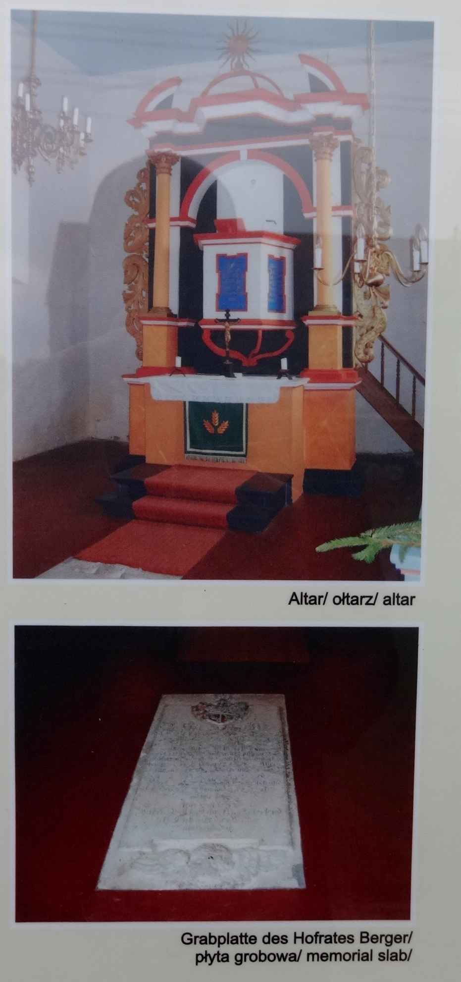 Dorfkirche Garzau, Feldsteinquaderbau aus dem 13. Jahrhundert im Landkreis Märkisch-Oderland, Brandenburg; Aufnahme auf einer öffentlich zugänglichen Informationstafel an der Kirche